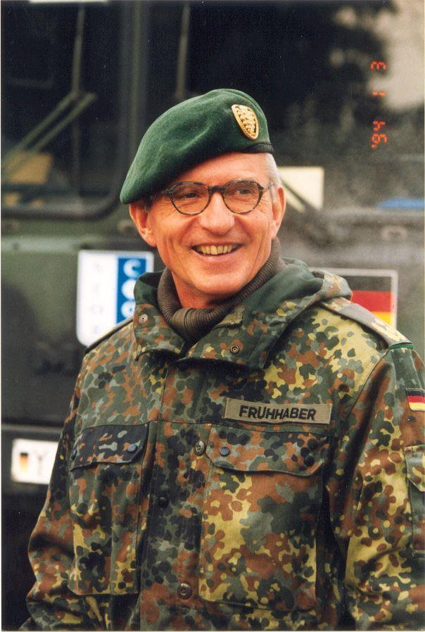 Klaus Frühhaber, DCOM SFOR 1996